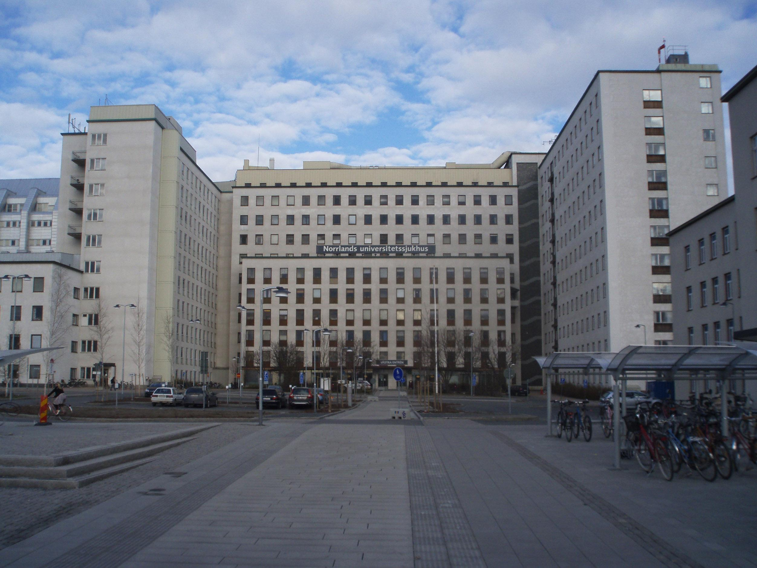 Norrlands universitetssjukhus